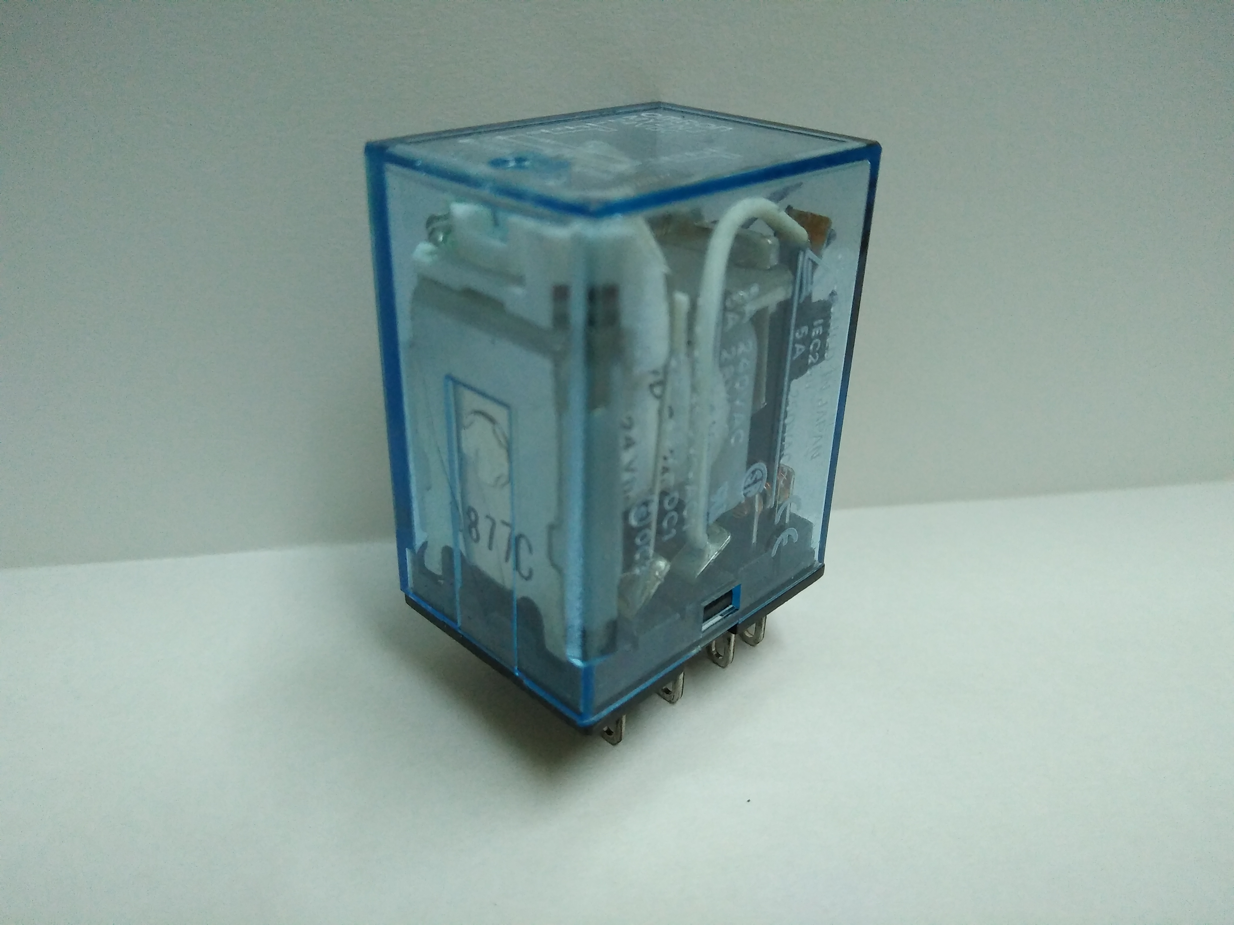 Relay外觀